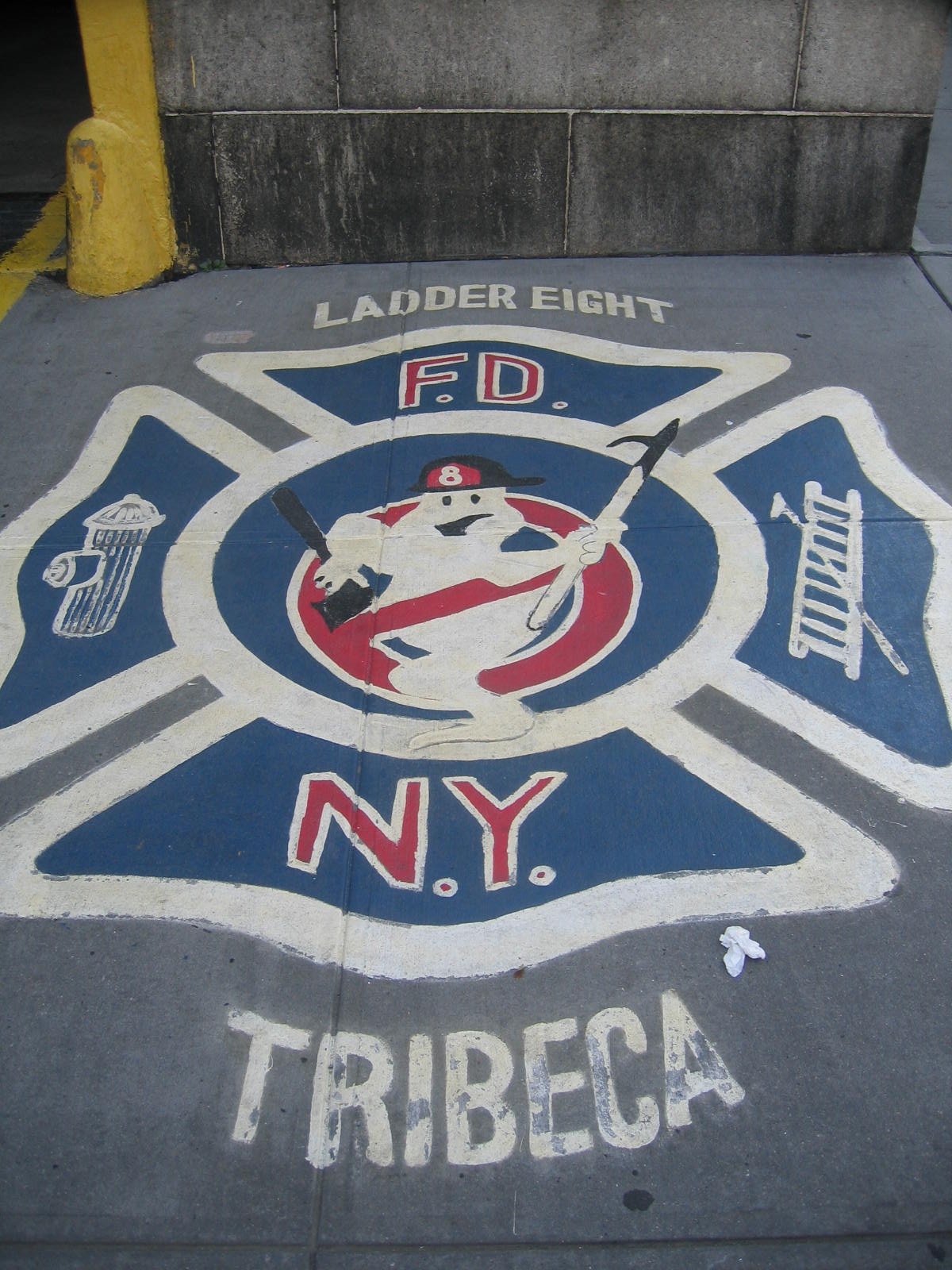 Caserne des pompiers a New York ou fut tourné SOS Fantômes.